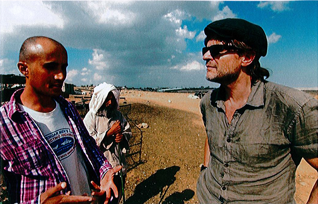 Andreas Altmann 2013 mit einem jungen Mann in Palästina